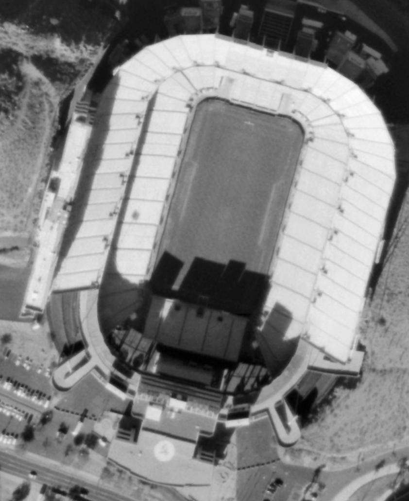 Sun Devil Stadium in Tempe, Arizona satellite image taken in 2002 (B&W)